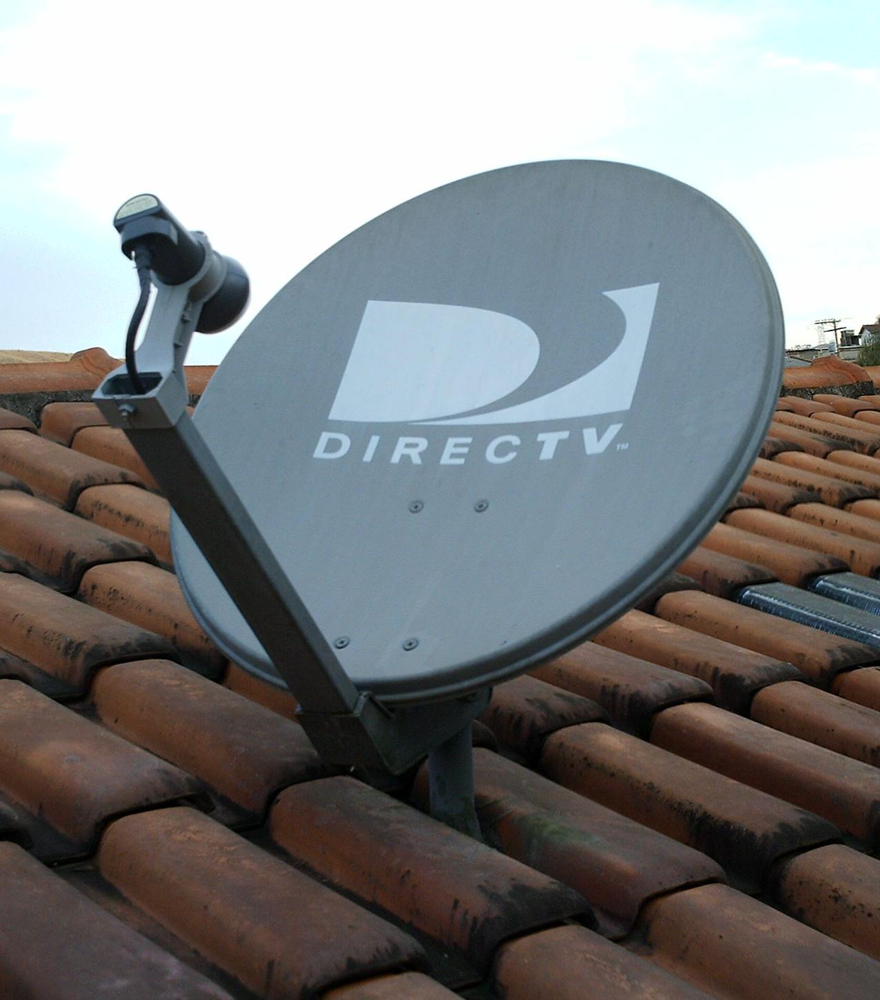 Antena DirecTV apontada para o satélite SKY (PAS 6B).